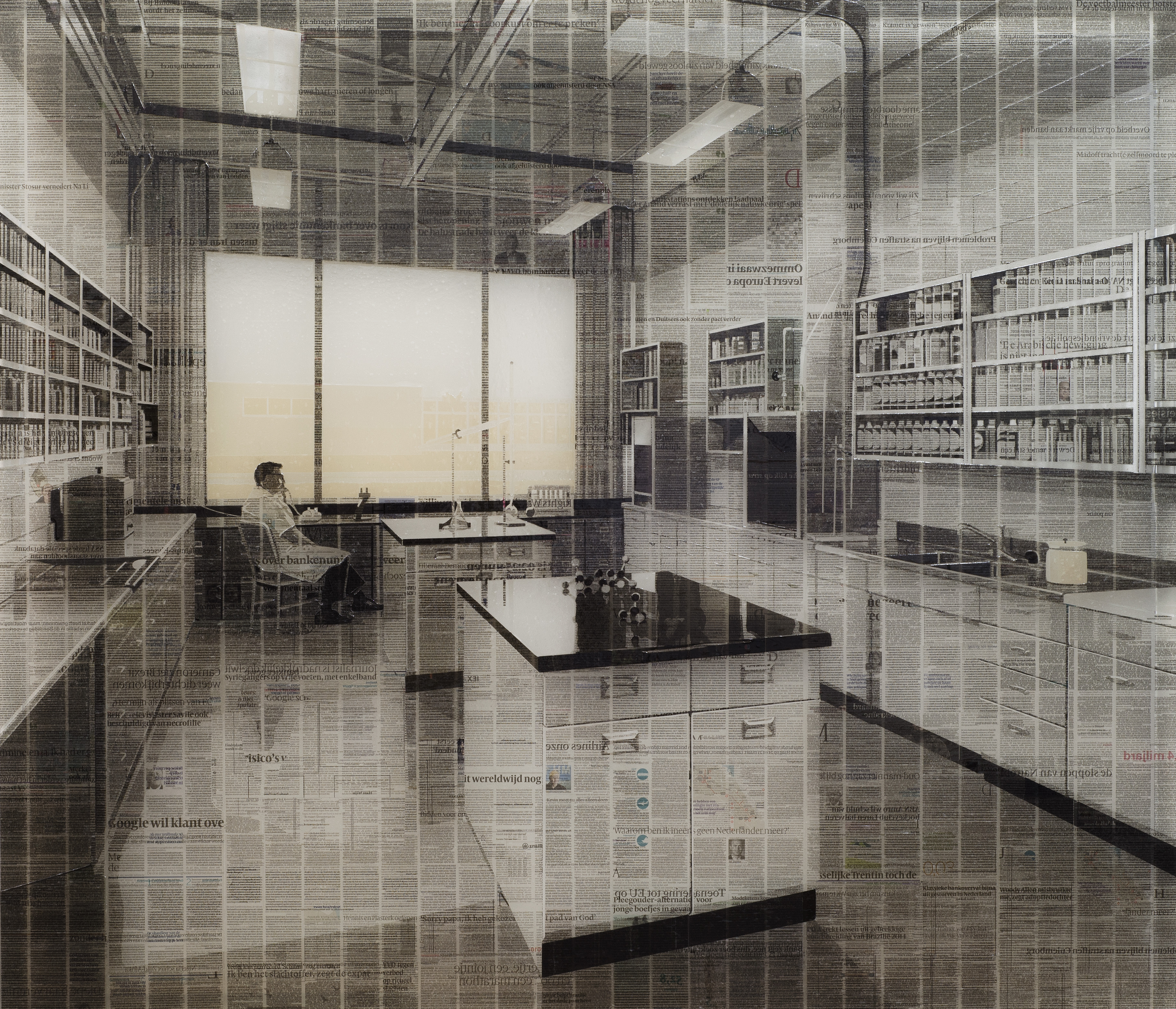 Collage met kranten en industriële lak op plexiglas